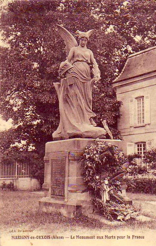 Marigny-en-Orxois, monument aux morts. Œuvre du sculpteur Achille Jacopin.